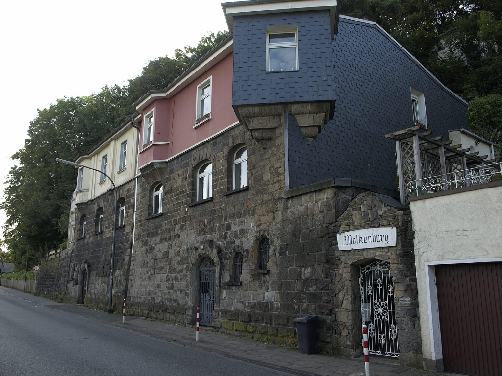 Wolkenburg 64/62 Wuppertal Quartier Südstadt